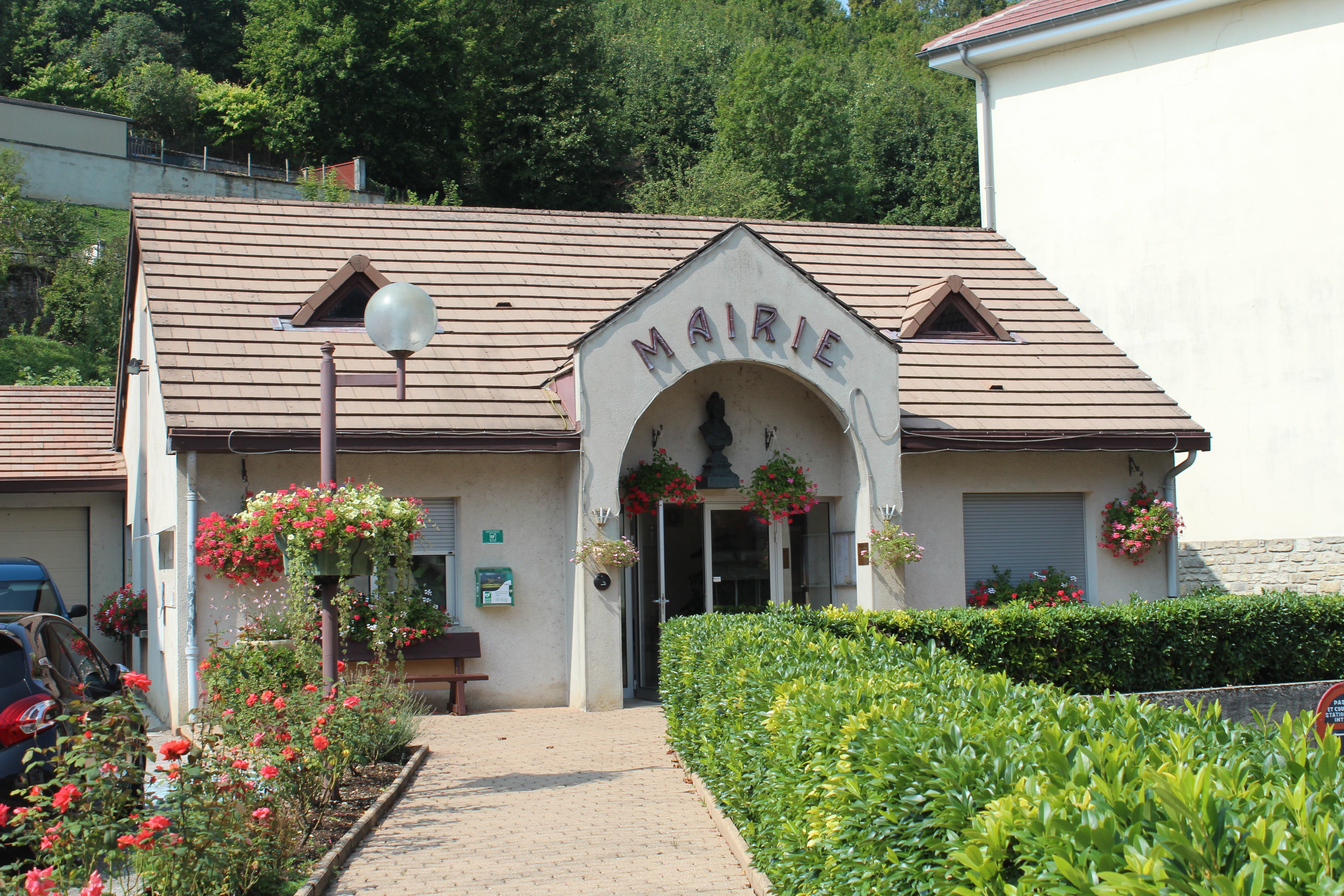 Mairie de Bracon.